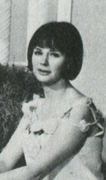 Skådespelare från den svenska långfilmen "För att inte tala om alla dessa kvinnor". Mona Malm.